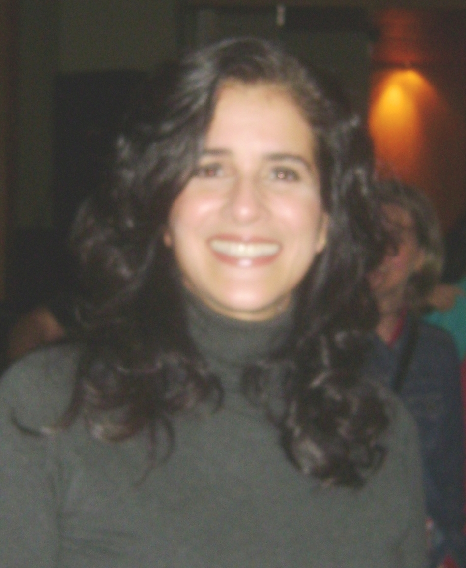 Lúcia Veríssimo, atriz brasileira, após a apresentação da peça "Uma Mulher do Outro Mundo", em São Paulo.